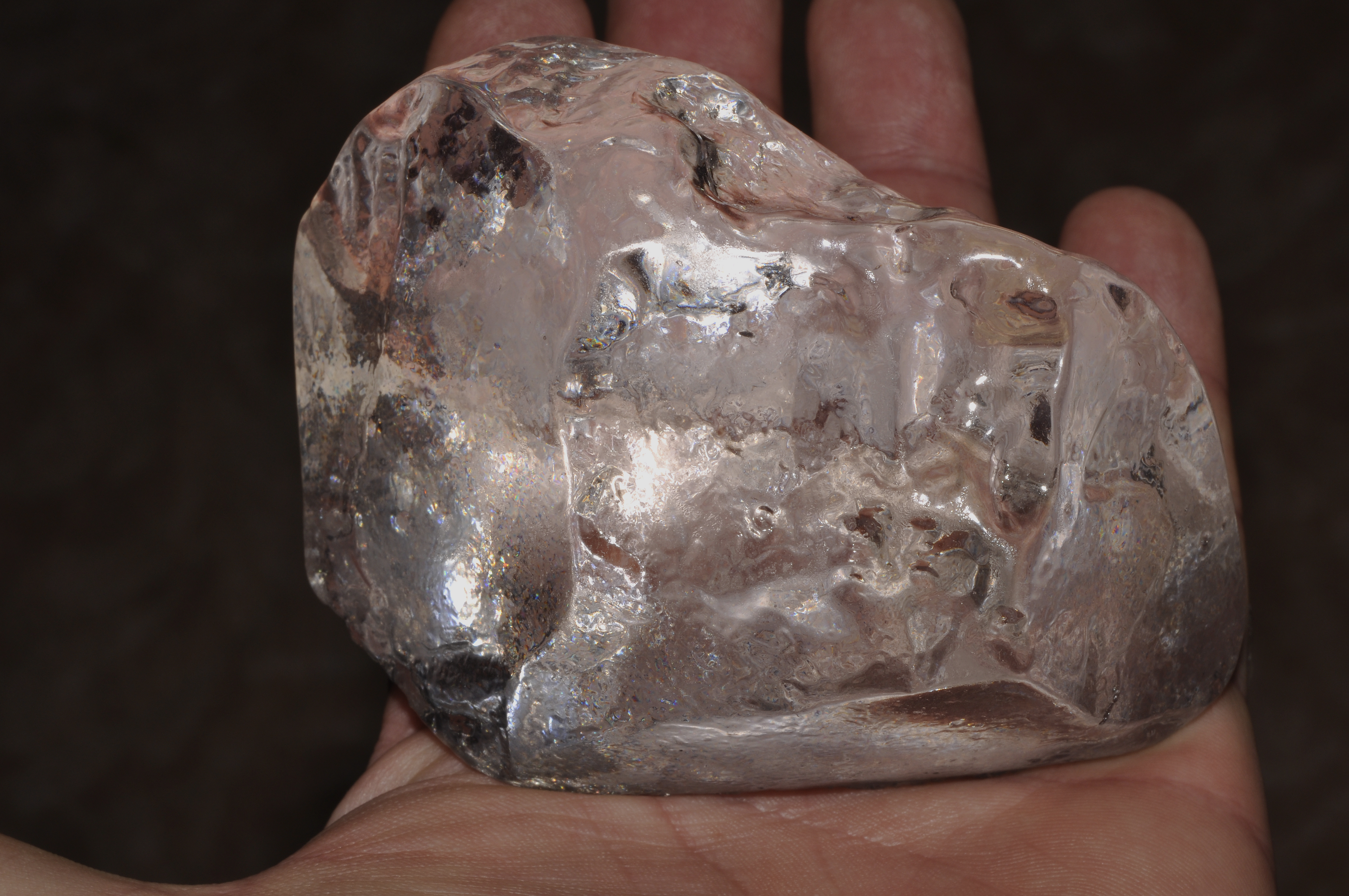 Reproduction à l'identique, en résine, du diamant Cullinan, le plus gros diamant trouvé à ce jour, 3106 carats = 621,2 gr. Il a été trouvé en 1905, près de Prétoria en Afrique du Sud, dans la mine Premier. De cette pierre brute, il fut tiré 9 grosses pierres et 96 pierres plus petites. Les deux plus importantes pierres, Cullinan I (530,2 carats = 106,04 gr) orne le sceptre royal des bijoux de la couronne d'Angleterre et Cullinan II (317,4 carats = 63,48 gr) orne le bandeau de la couronne royale d'Angleterre.